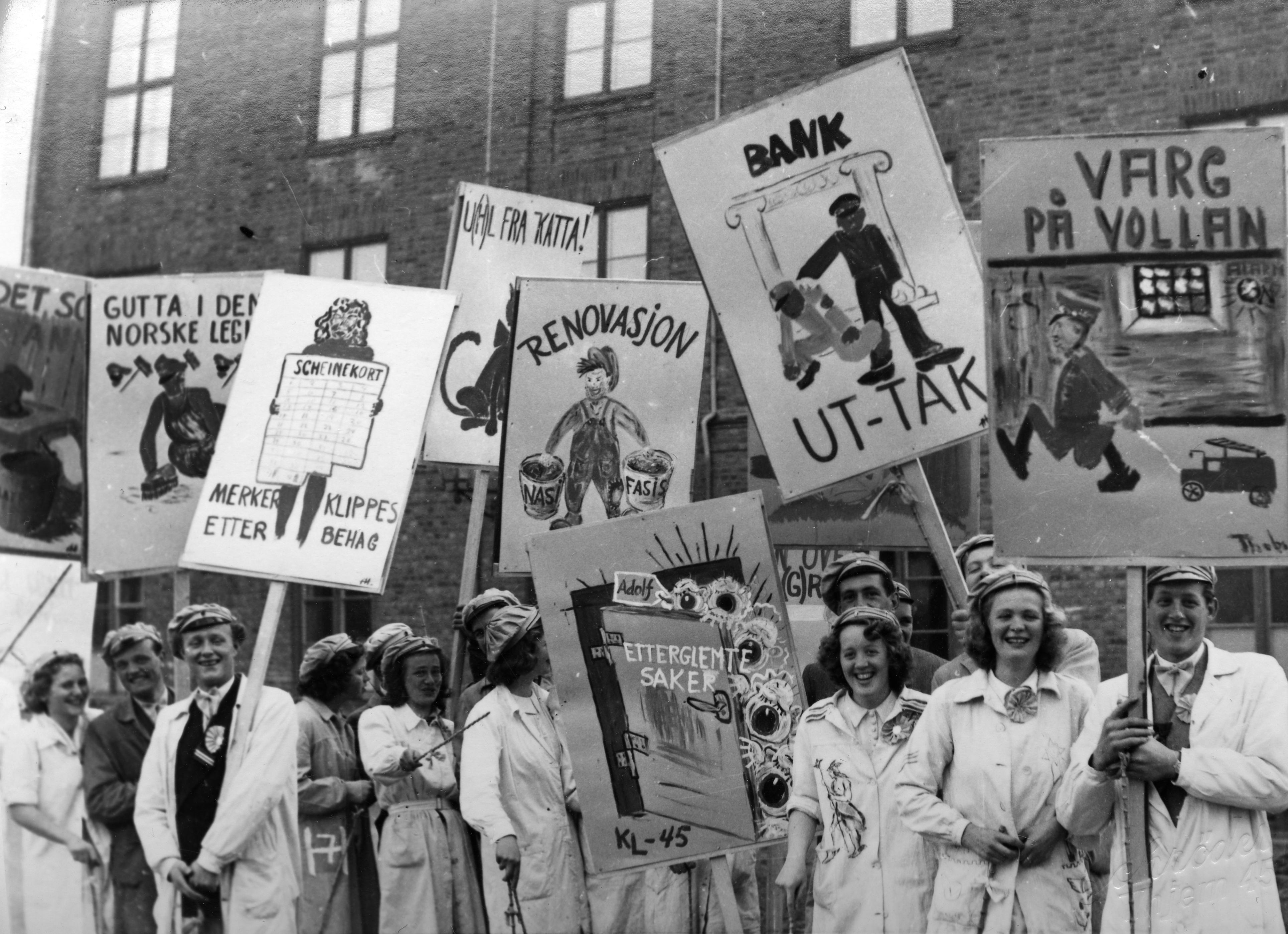 Format: Fotopositiv Dato / Date: 17. mai 1945 Fotograf / Photographer: Mulig Schrøder eller Trygve Gjervan (1918 - 2004) Sted / Place: Katedralskolen, Trondheim Wikipedia: Trondheim katedralskole Wikipedia: Russefeiring Wikipedia: Russefeiring (eng) Eier / Owner Institution: Trondheim byarkiv, The Municipal Archives of Trondheim Arkivreferanse / Archive reference: Tor.H42.B53.F23871 Merknad: Fra Trygve Gjervans privatarkiv. "Varg på Vollan" referer til brannmester under krigen Eugen Vargdal i fangenskap ved Vollan kretsfengsel.